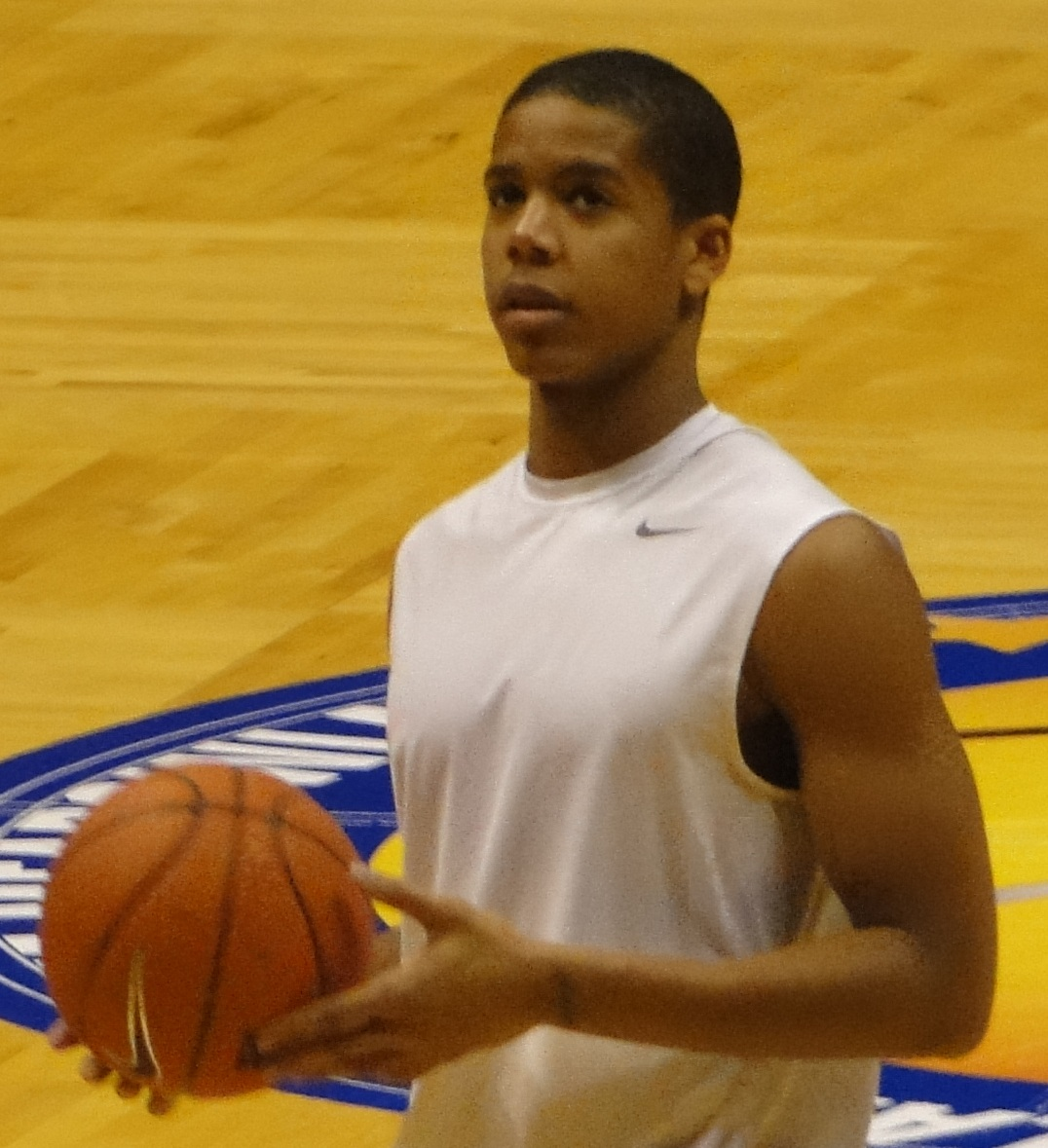 Andre Dawkins